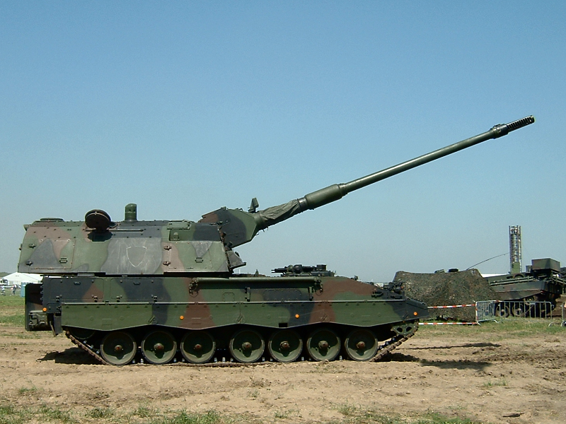 PzH2000 Houwitser, Koninklijke Landmacht. Specificaties: Indienststelling: 2005 Lengte (zonder schietbuis) 8330 mm Lengte (met schietbuis) 11630 mm. Breedte 3560 mm. Hoogte (minimaal) 3065 mm. Hoogte (maximaal) 3460 mm (met mitrailleur en periscoop) Gewicht 55 ton Motor 8 cilinder diesel, 736kW Bemanning 5 personen Bewapening 155 mm L52 MAG 2000, mitrailleur Rookgranaatwerpers Dracht: 40 - 50 km